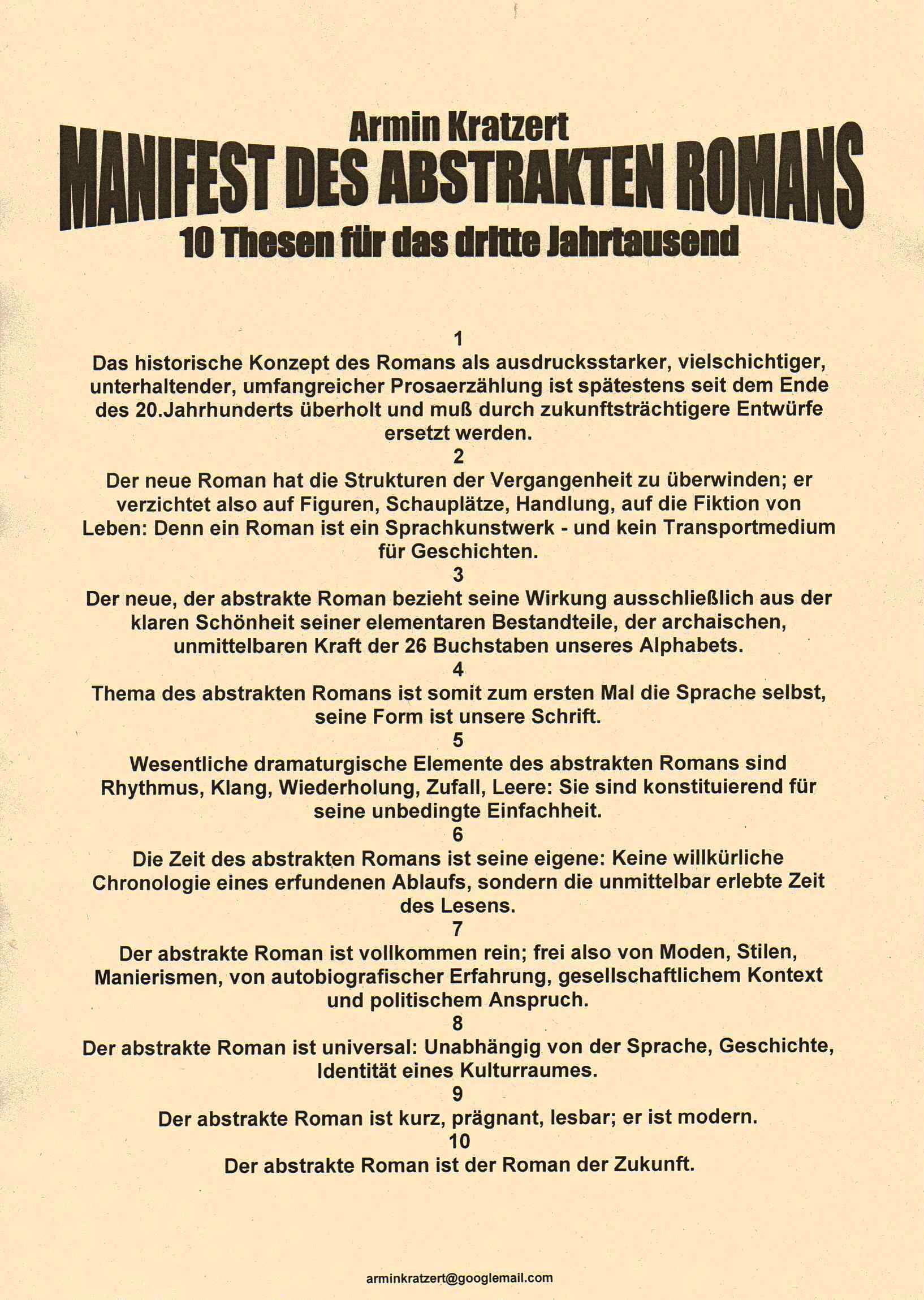 10 Thesen für das dritte Jahrtausend - 2001 aufgestellt von Armin Kratzert (Deutscher Schriftsteller)